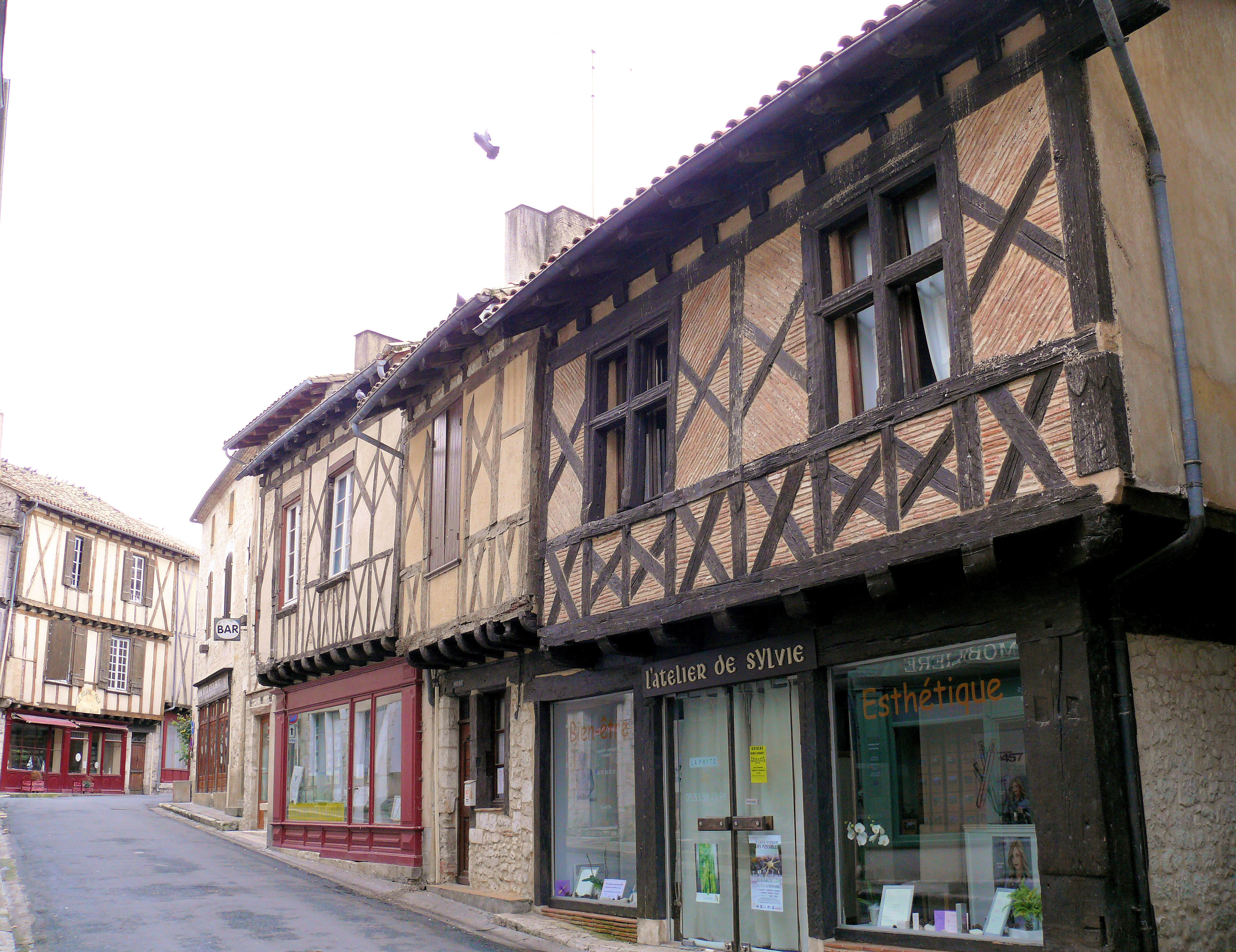 Issigeac - Une rue